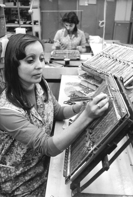 VEB Robotron Elektronik Dresden, Endmontage ADN-ZB Häßler 2.11.81 Dresden-Integration- Bisher 50 Rechner wurden in diesem Jahr aus dem Kombinat Robotron, hier Brigitte Landweer bei der Endmontage eines Paneels für die Zentraleinheit eines Rechners, an die UdSSR ausgeliefert. Vor 15 Jahren war in dem Dresdner Betrieb die erste elektronische Datenverarbeitungsanlage der DDR produziert worden.